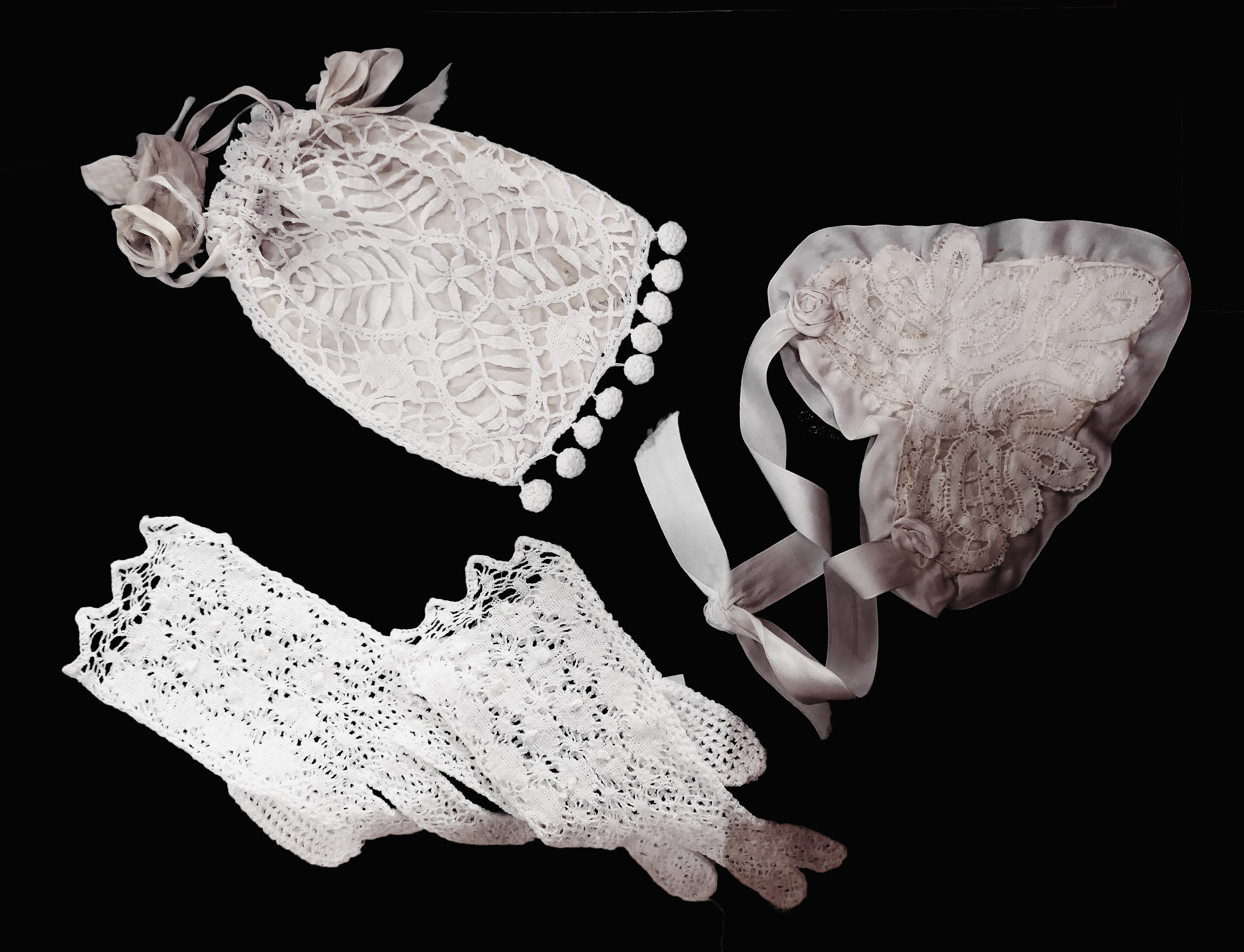 Aumonières et gants (dentelle de Mirecourt, Vosges, France) Début du XXe siècle, coton Réalisés pour les communions, ces objets se transmettaient de mère en fille jusque dans les années 1950 Collection Association Renouveau et promotion de la dentelle de Mirecourt Maison de la musique mécanique et de la dentelle à Mirecourt